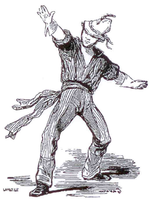 Une personnalité du Carnaval de Paris : Balochard.